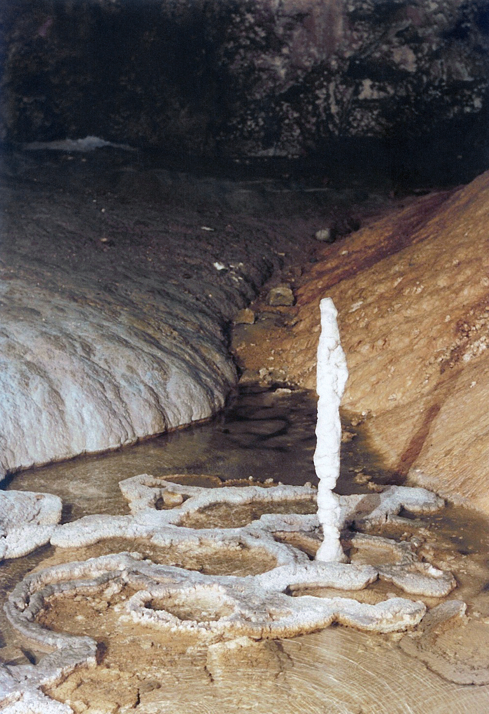 Szűzterem a szolcsvai Búvópatak barlangjában